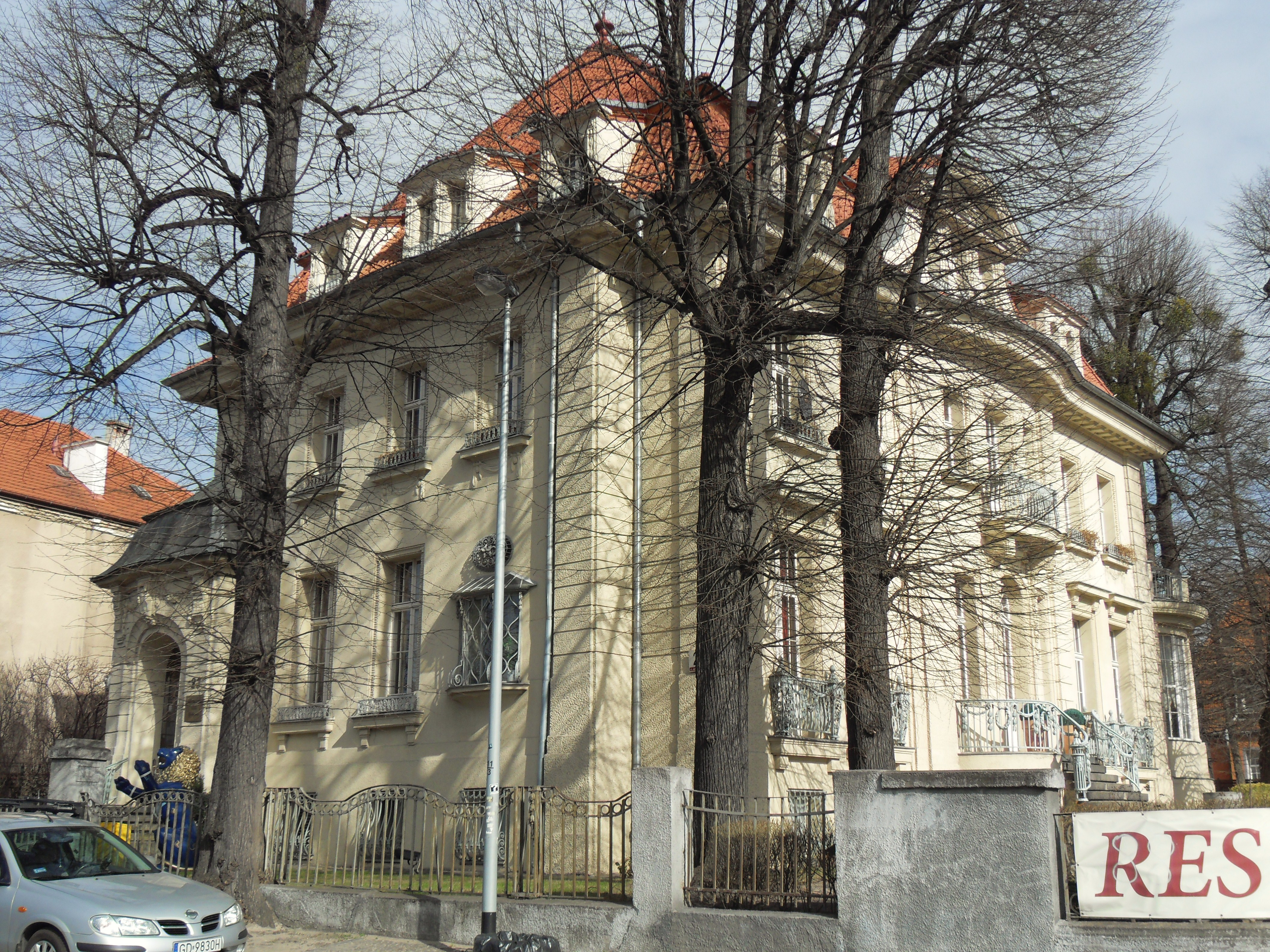 Gdańsk Wrzeszcz Górny, ul. Jana Uphagena 23 - willa, 1908-1909